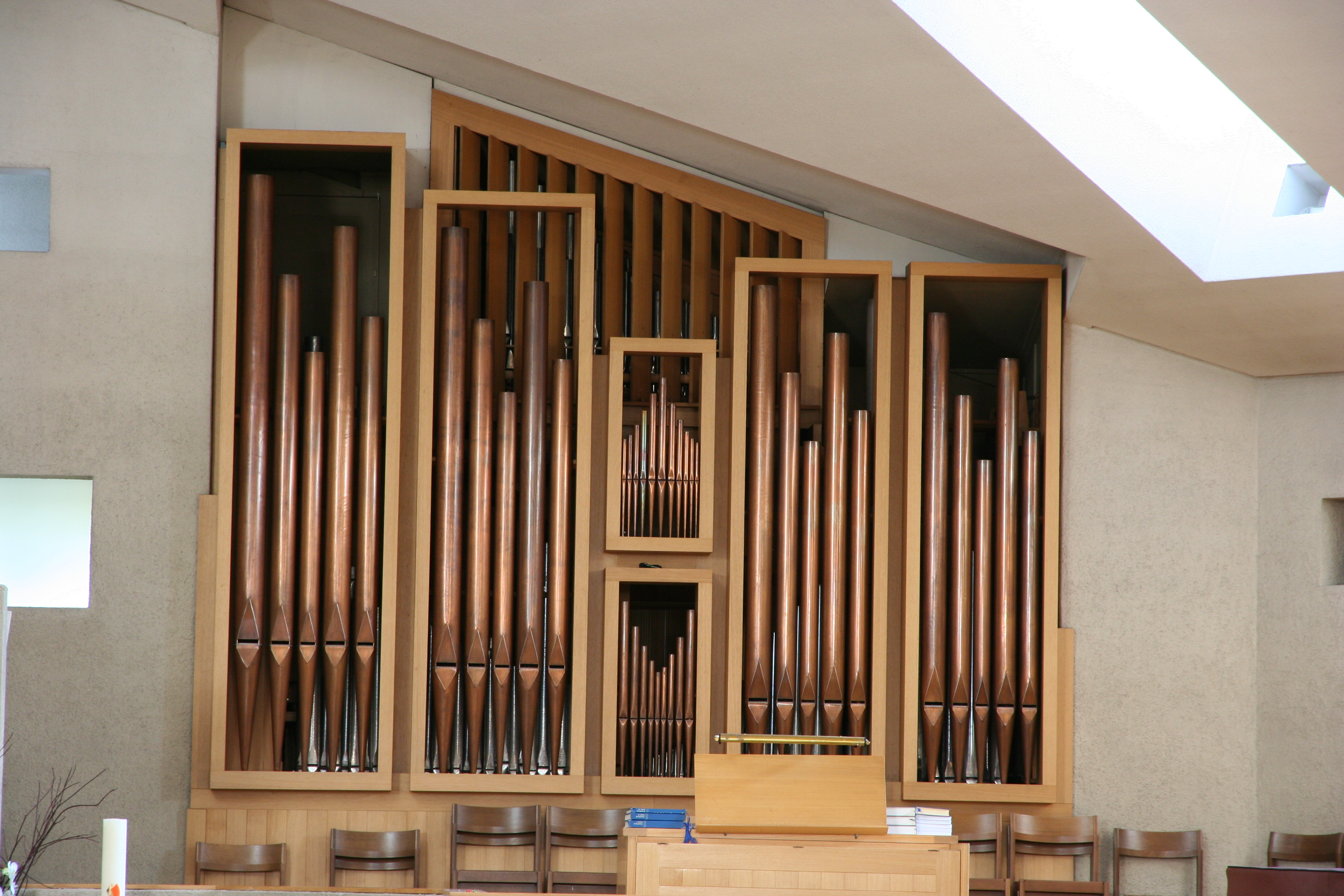 Römisch-katholische Kirche St. Franziskus Kempraten in Rapperswil-Jona